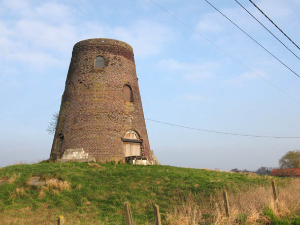 Oude_Tieltstraat_znr_Vlaagtmolen